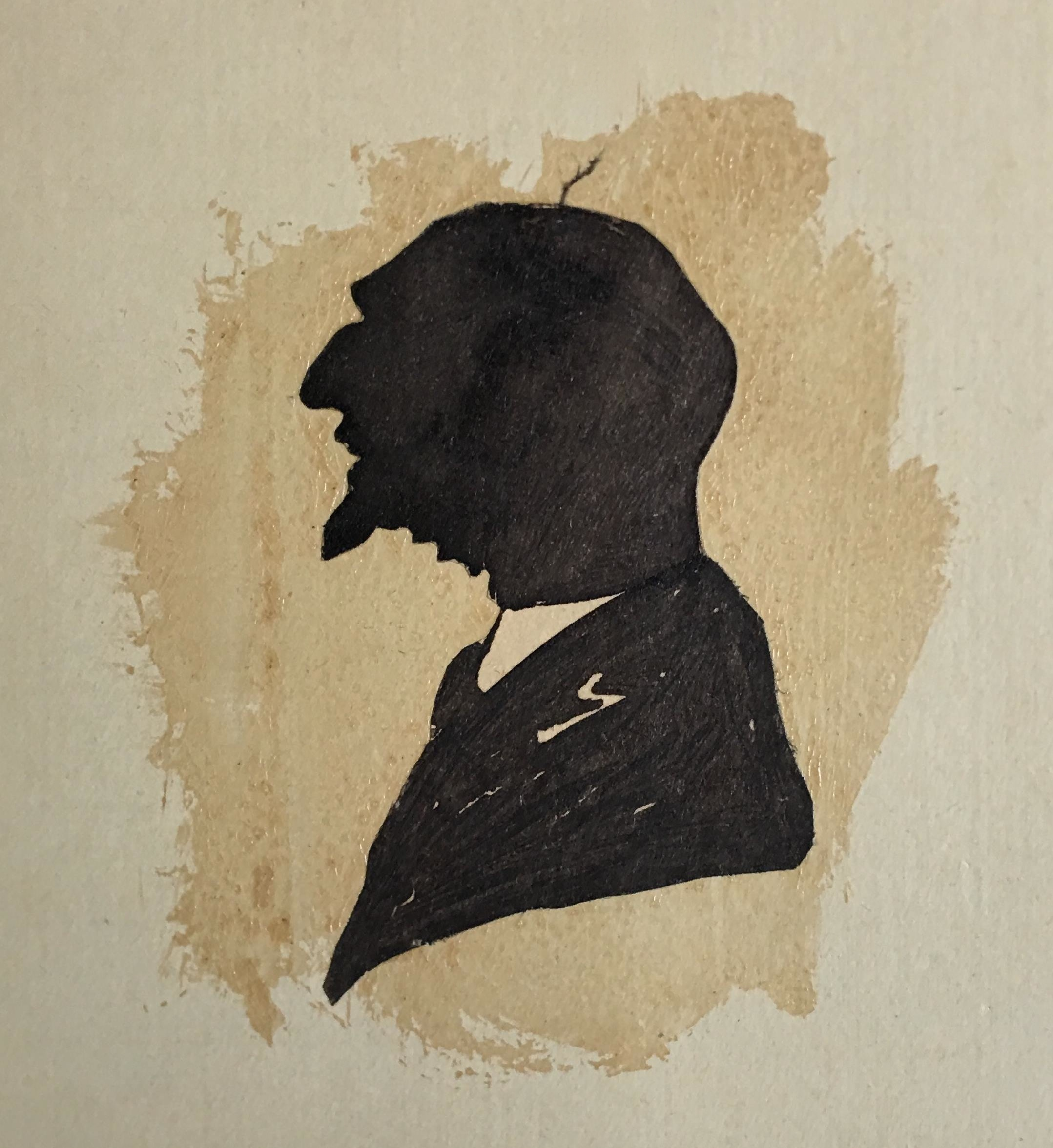 Efígie do compositor francês Fernand Jouteux (1866-1956), por autor desconhecido, provavelmente entre 1921-1925